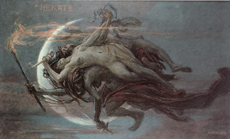 HEKATE